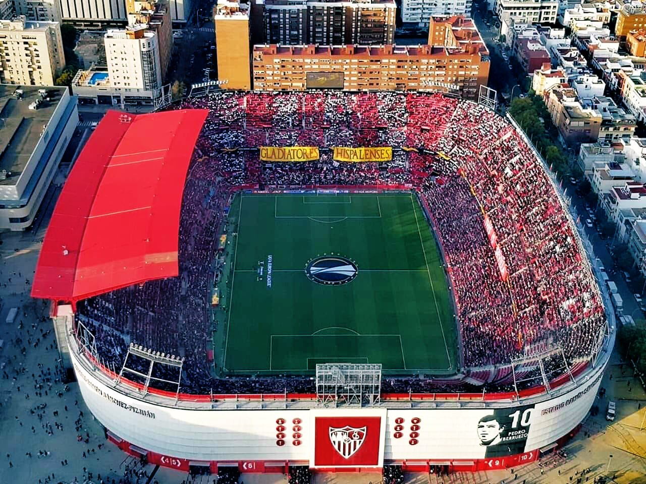 Estadio Ramón Sánchez Pizjuan